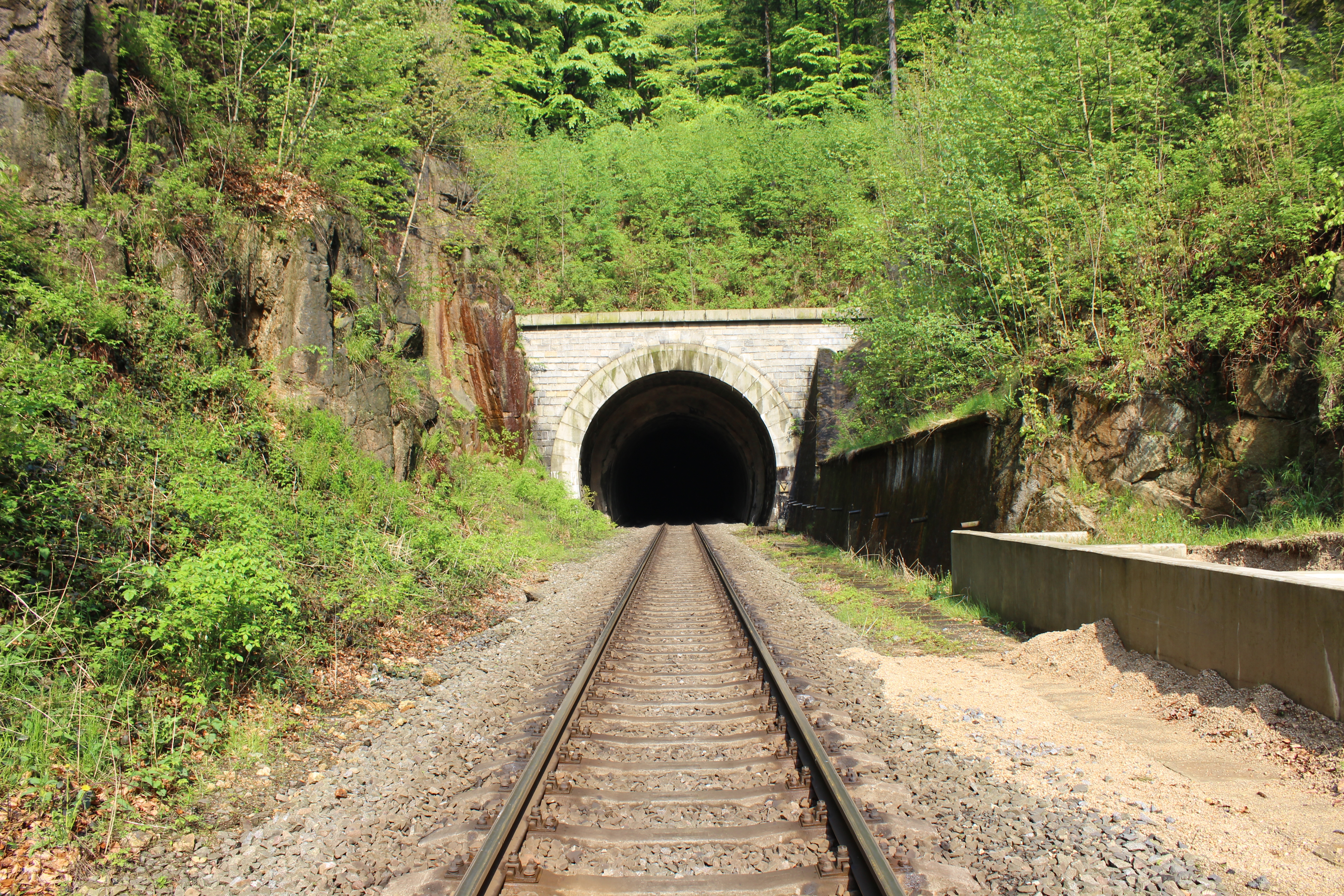 Oldřichovský (liberecký) portál Mníšeckého tunela na trati 037 Liberec-Zawidów. This photograph was taken with a Canon EOS 600D.